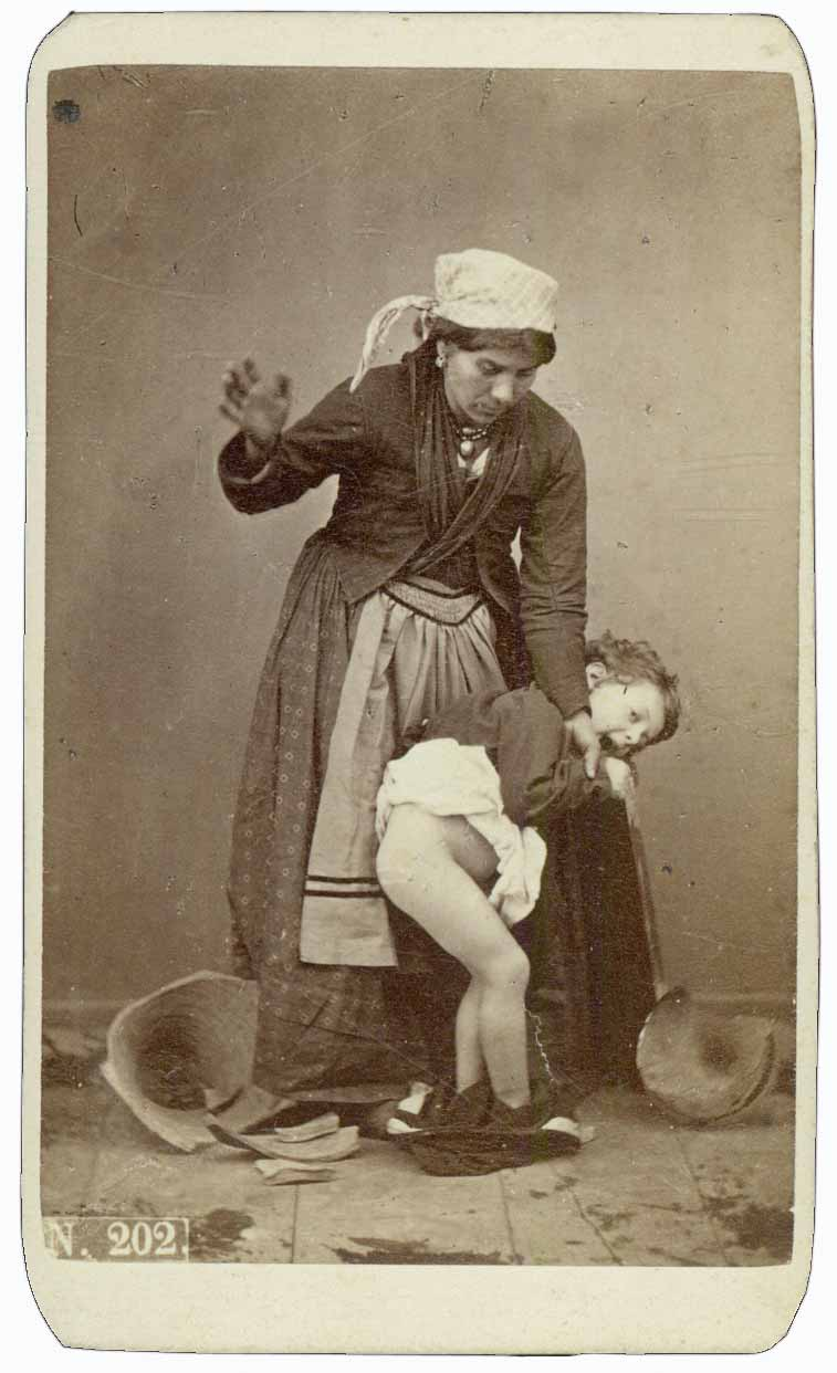 Genrebild, Neapel um 1880, Fotografie von Giorgio Conrad, Albuminabzug. Bildgrösse 92 x 59 mm, Träger 102 x 61 mm.